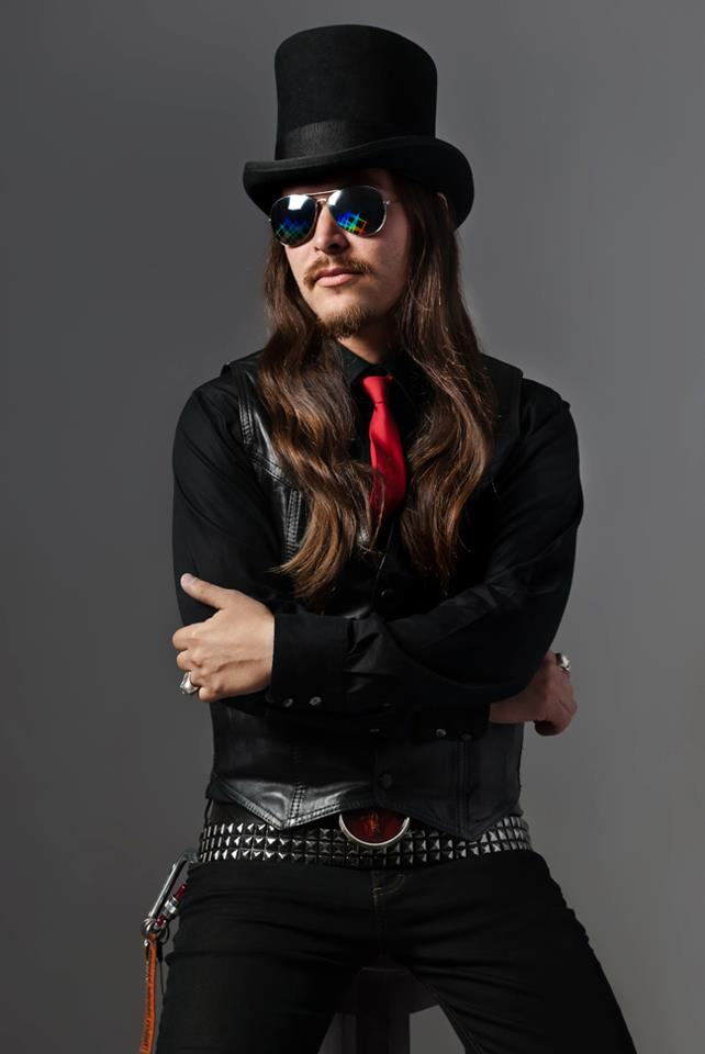 Foto de Nial Gandarilla Vocalista de Lickstick